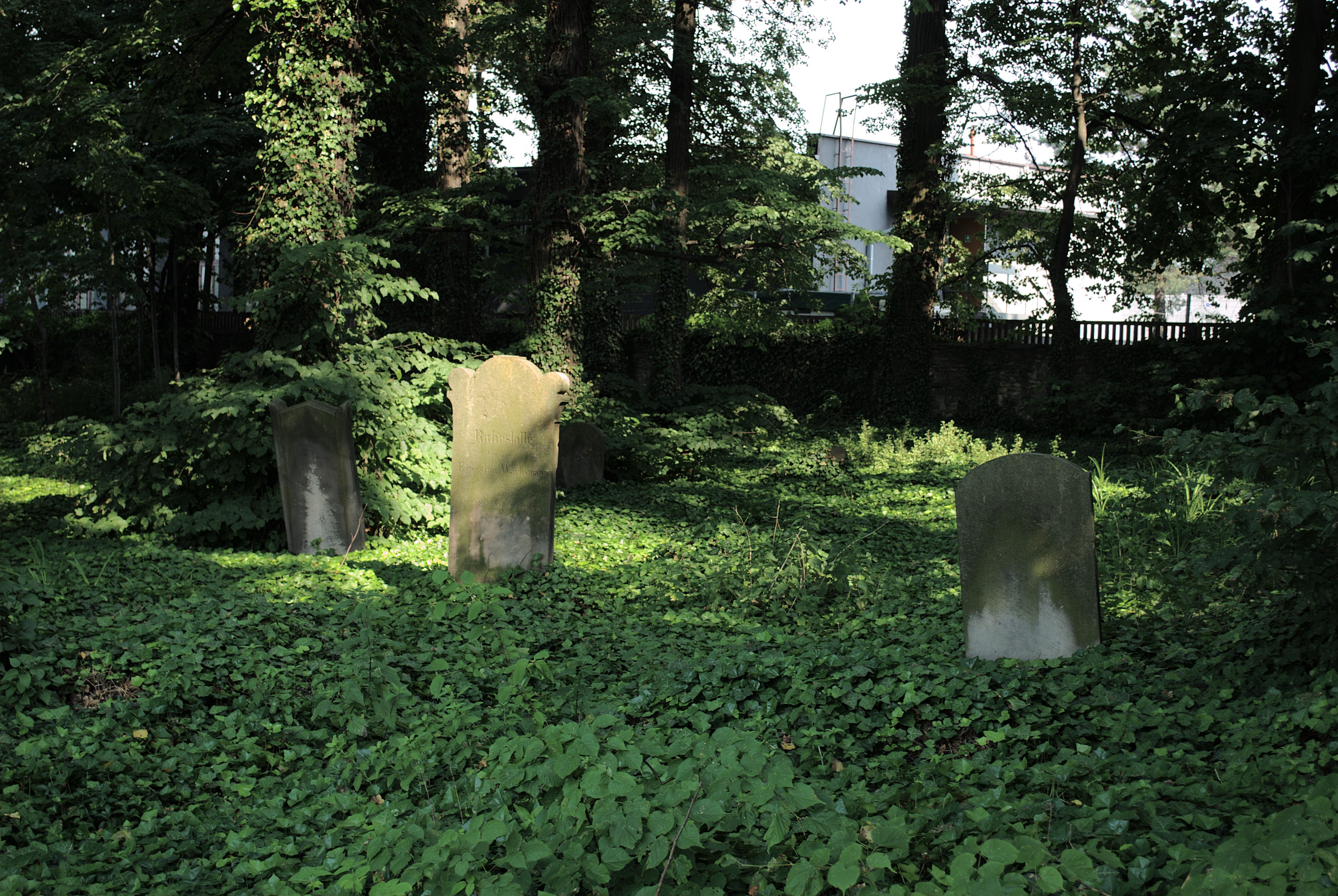 Cmentarz żydowski w Toszku.